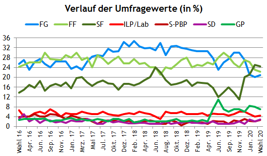 Umfragen für die Parlmentswahl in Irland 2020